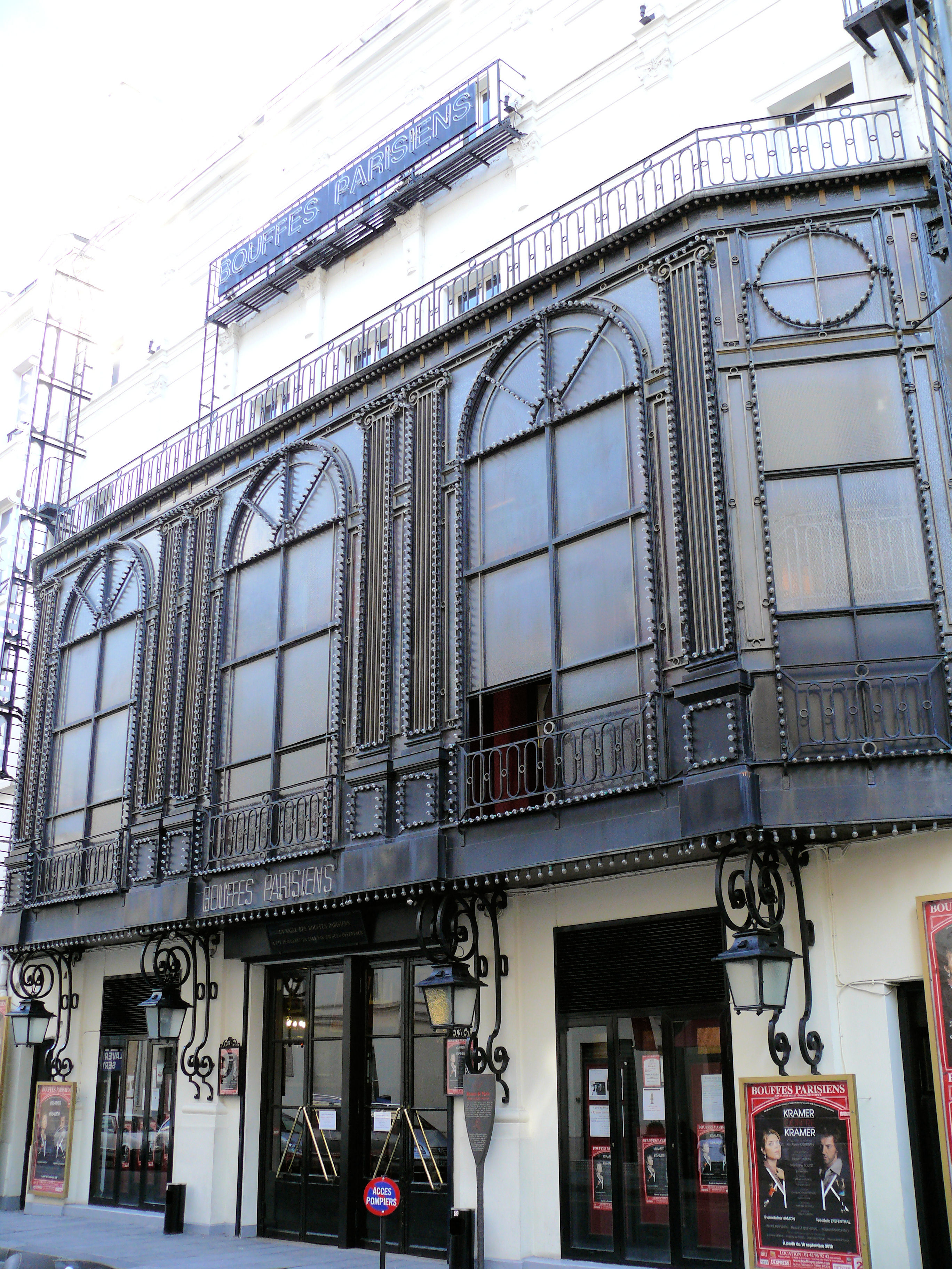 Paris 2ème arrondissement - Théâtre des Bouffes-Parisiens